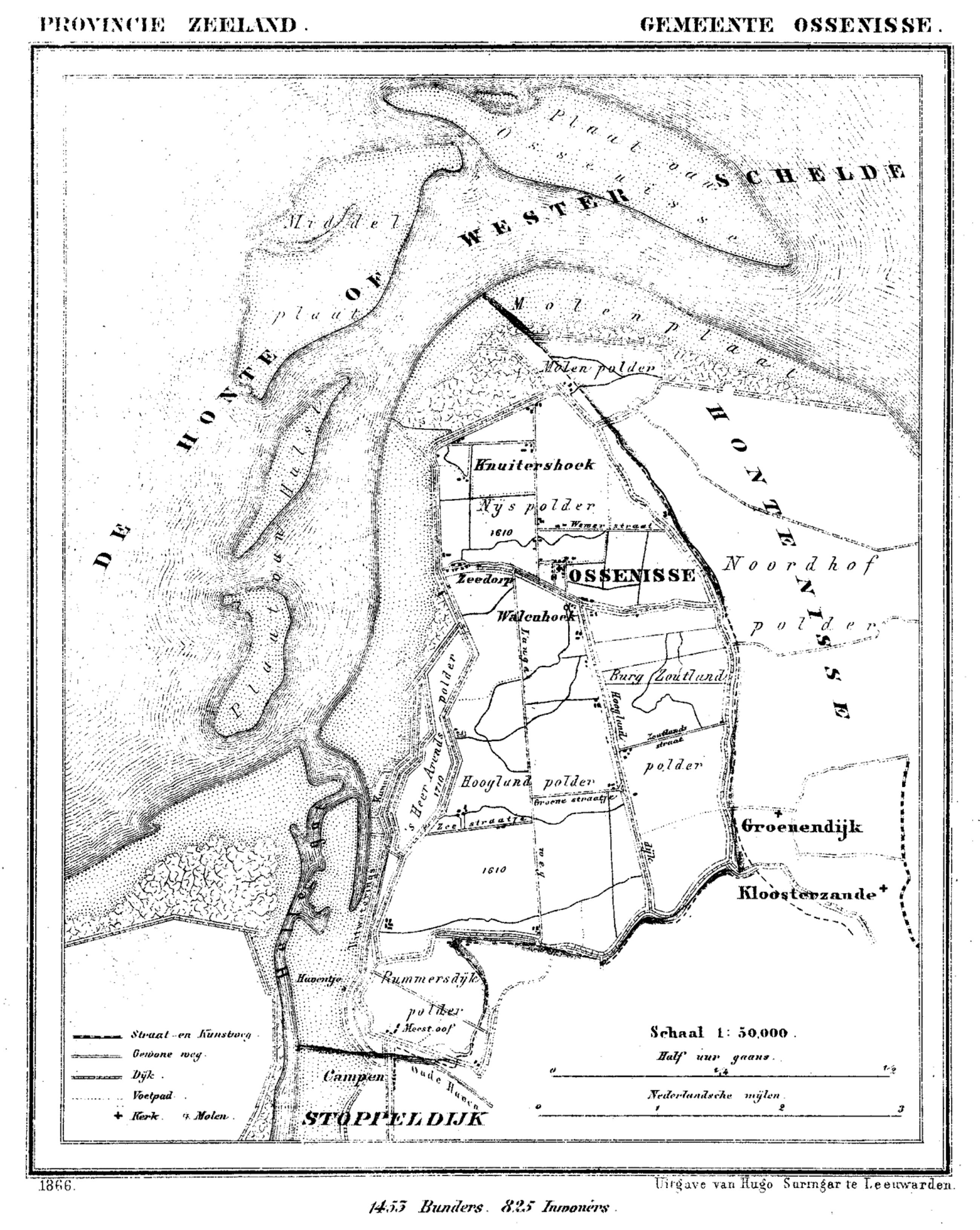 Gemeente Ossenisse, Zeeland, Nederland